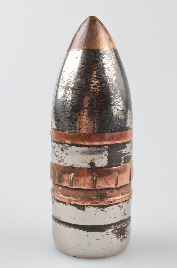 Granaten er fra 1. verdenskrig, og har været i familiens eje i flere generation. Ingen kan længere huske, hvordan den er kommet til familien. Den bærer numrene 1279 og 30308 indgraveret.